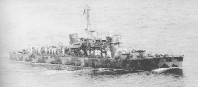 中華民国海軍 「閩江」（元日本海軍 「第九号駆潜艇」）